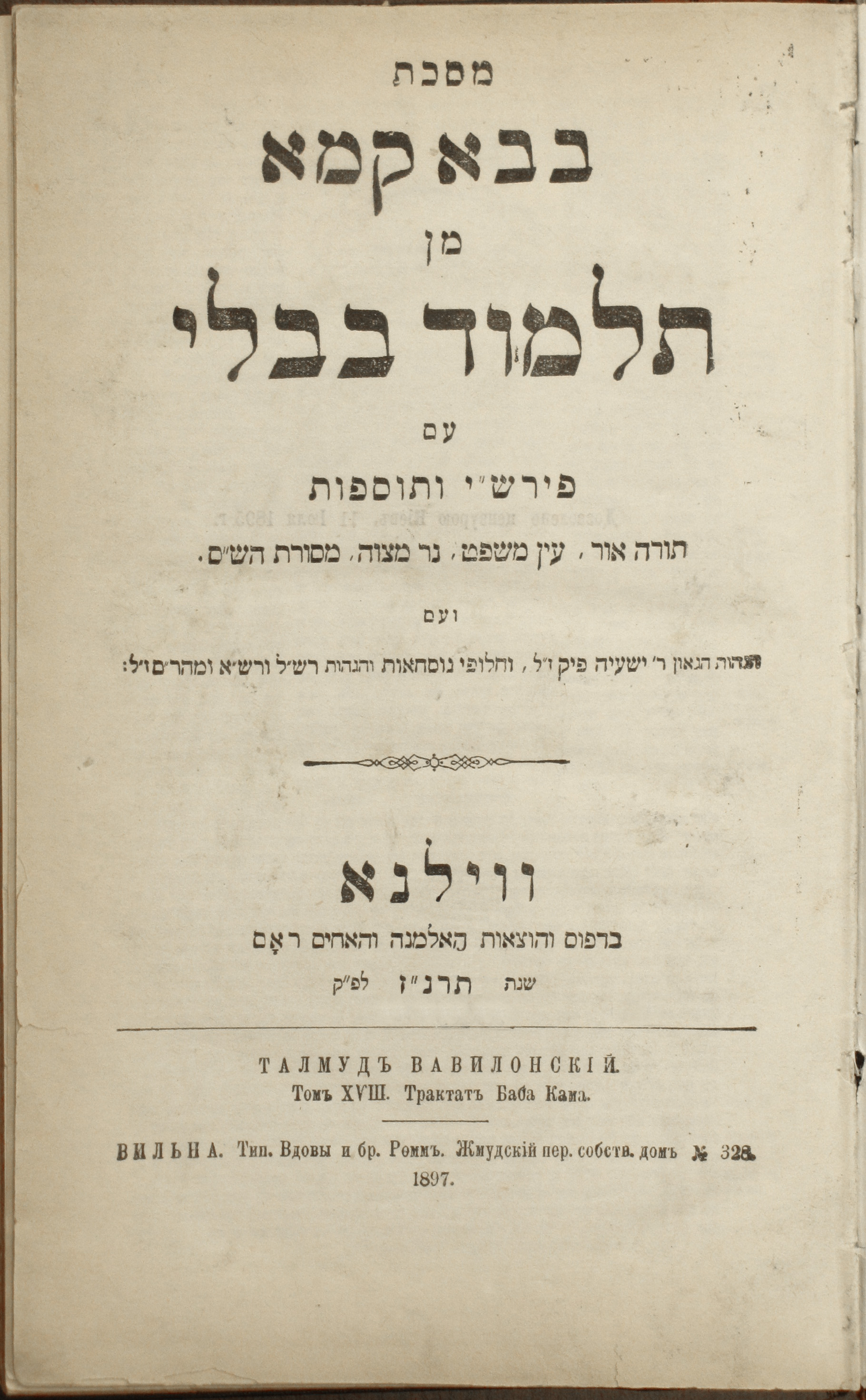 Виленский ШАС, Титульный лист 18-го тома